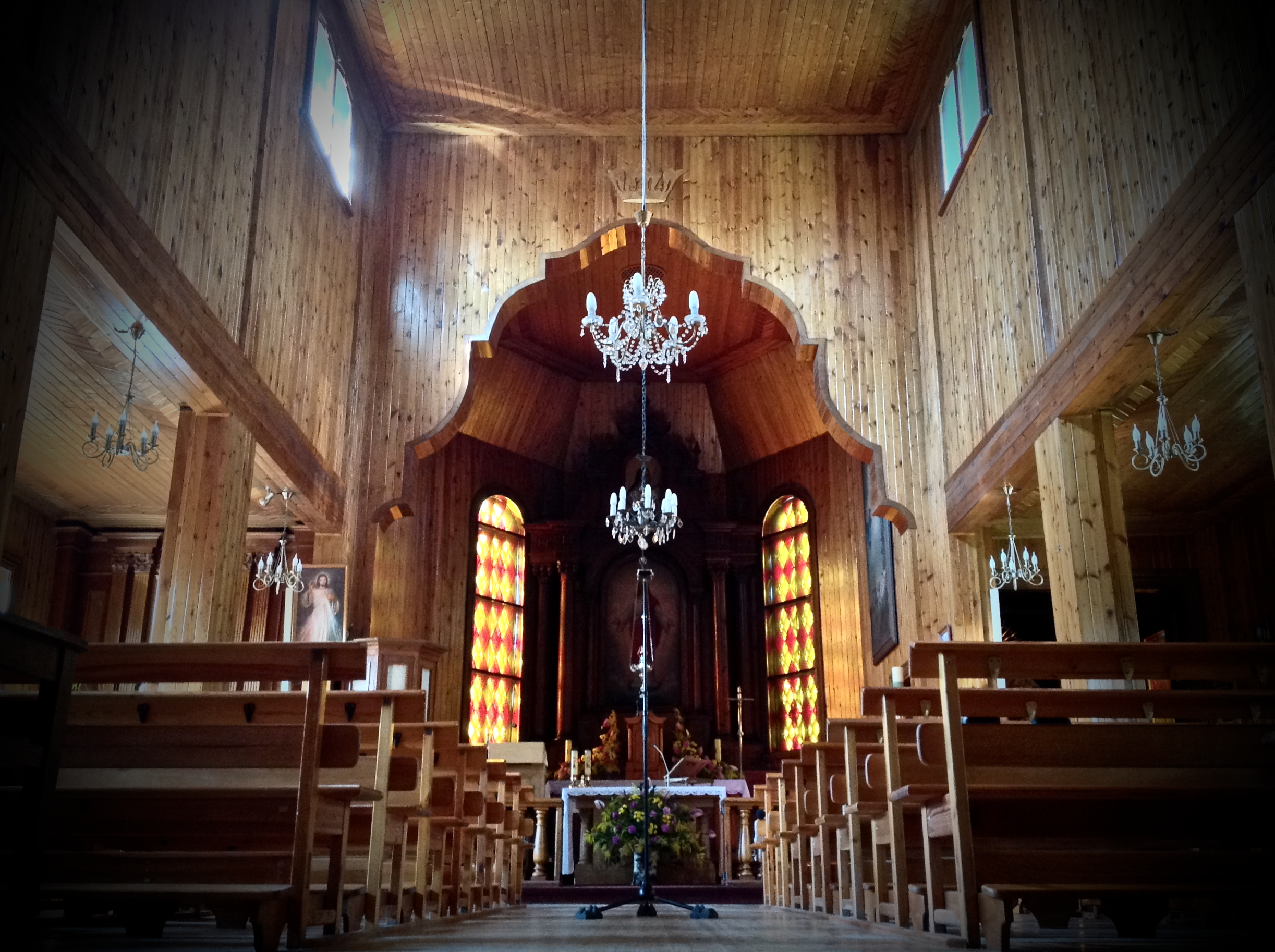 Medinė pavilnio bažnyčia 2017 metų vasaros pabaigoje. Interjeras. Altorius.